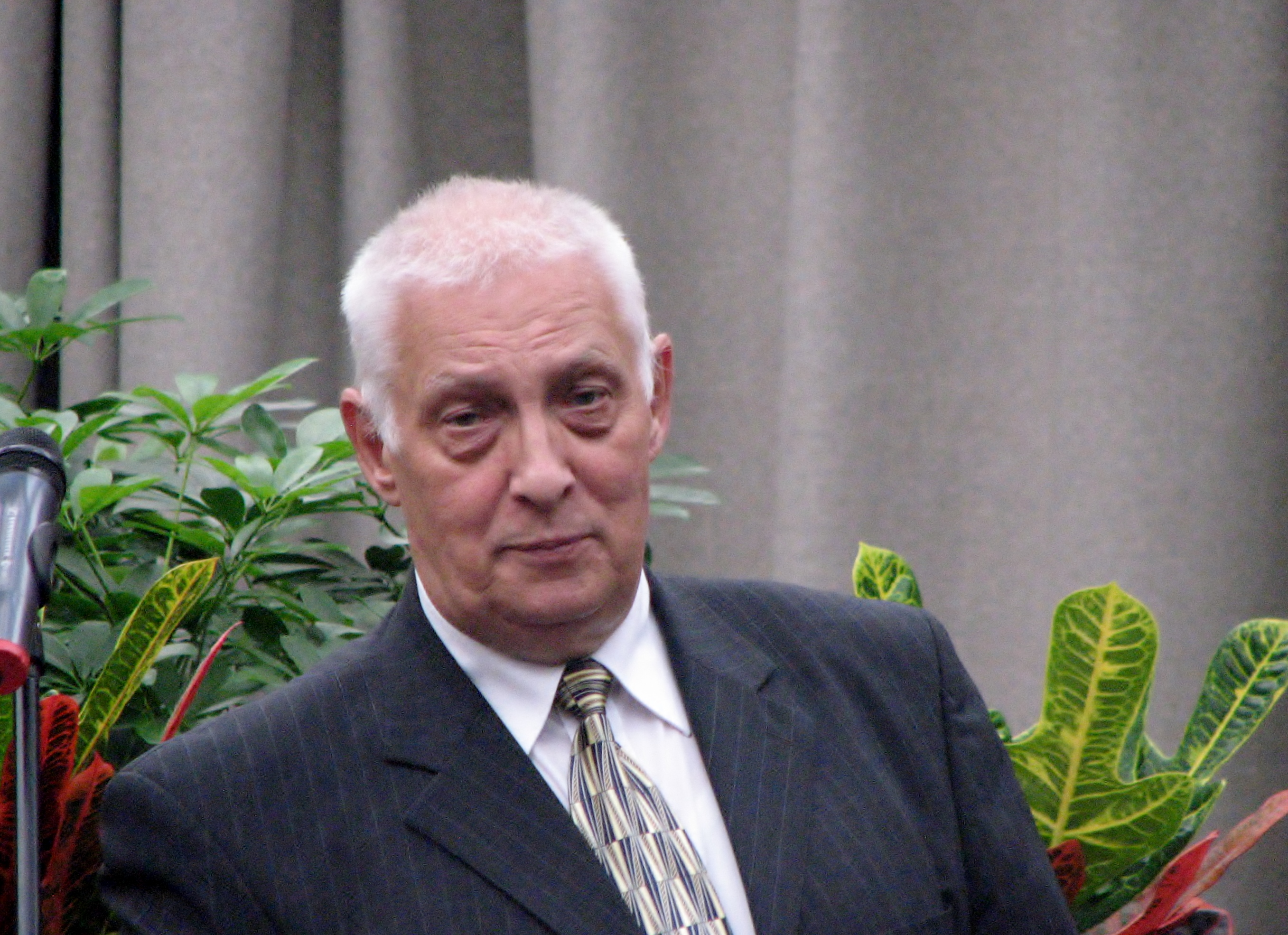 Lembit Lõhmus Estonia maja 100 postmargi ja Schützi viiuli esitlusel